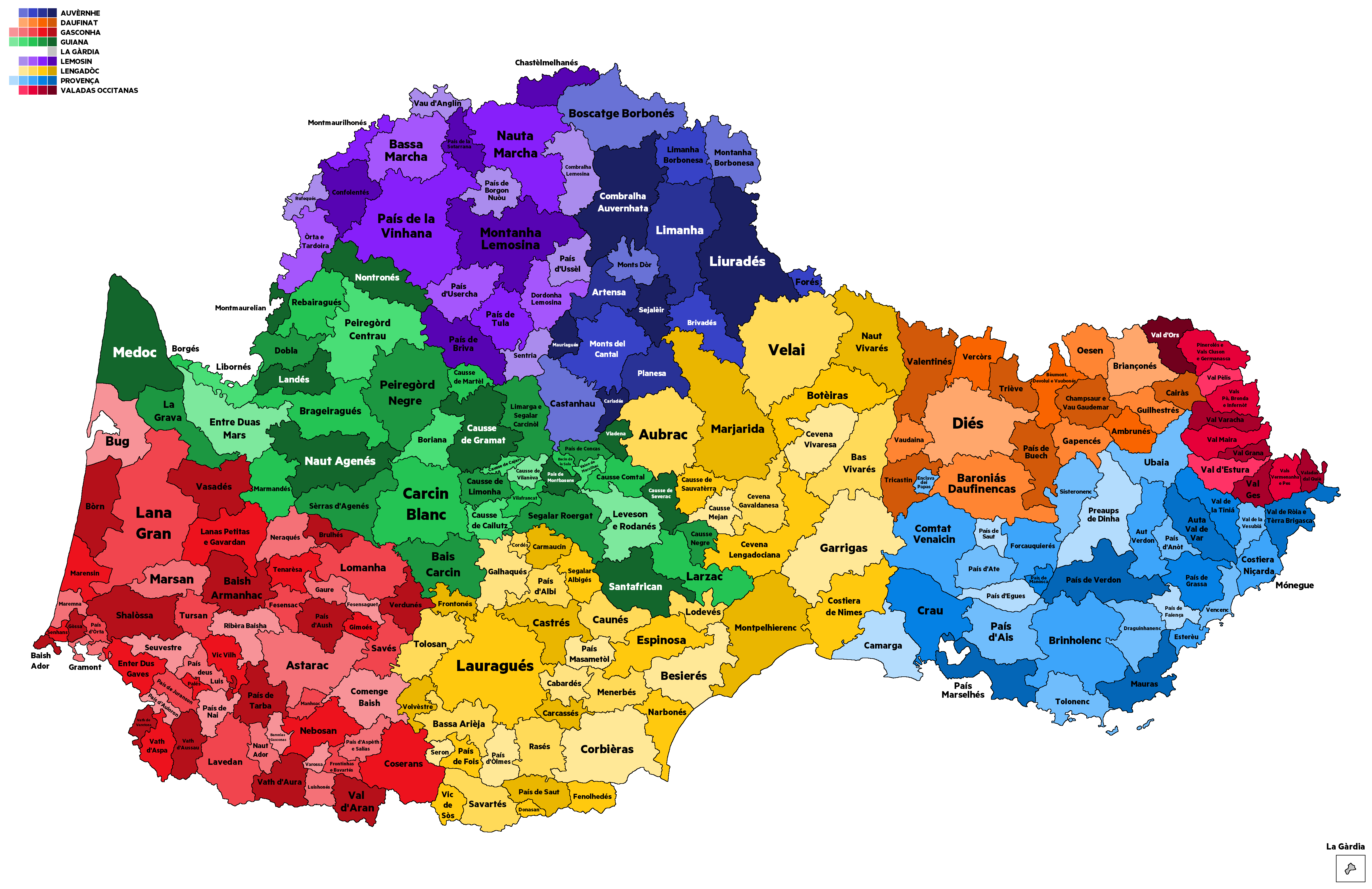 Las encontradas / parçans d'Occitània